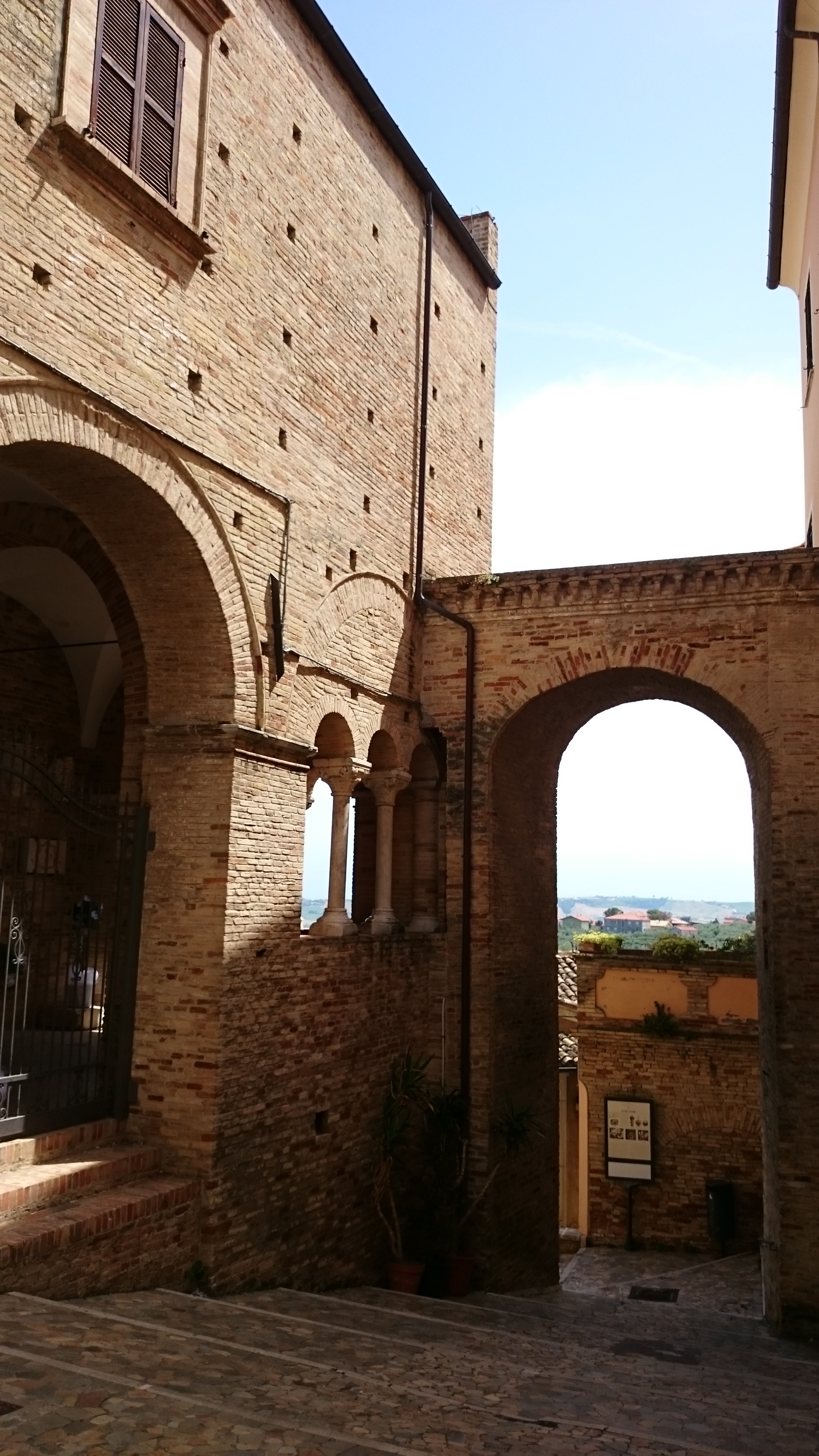 Loreto Aprutino